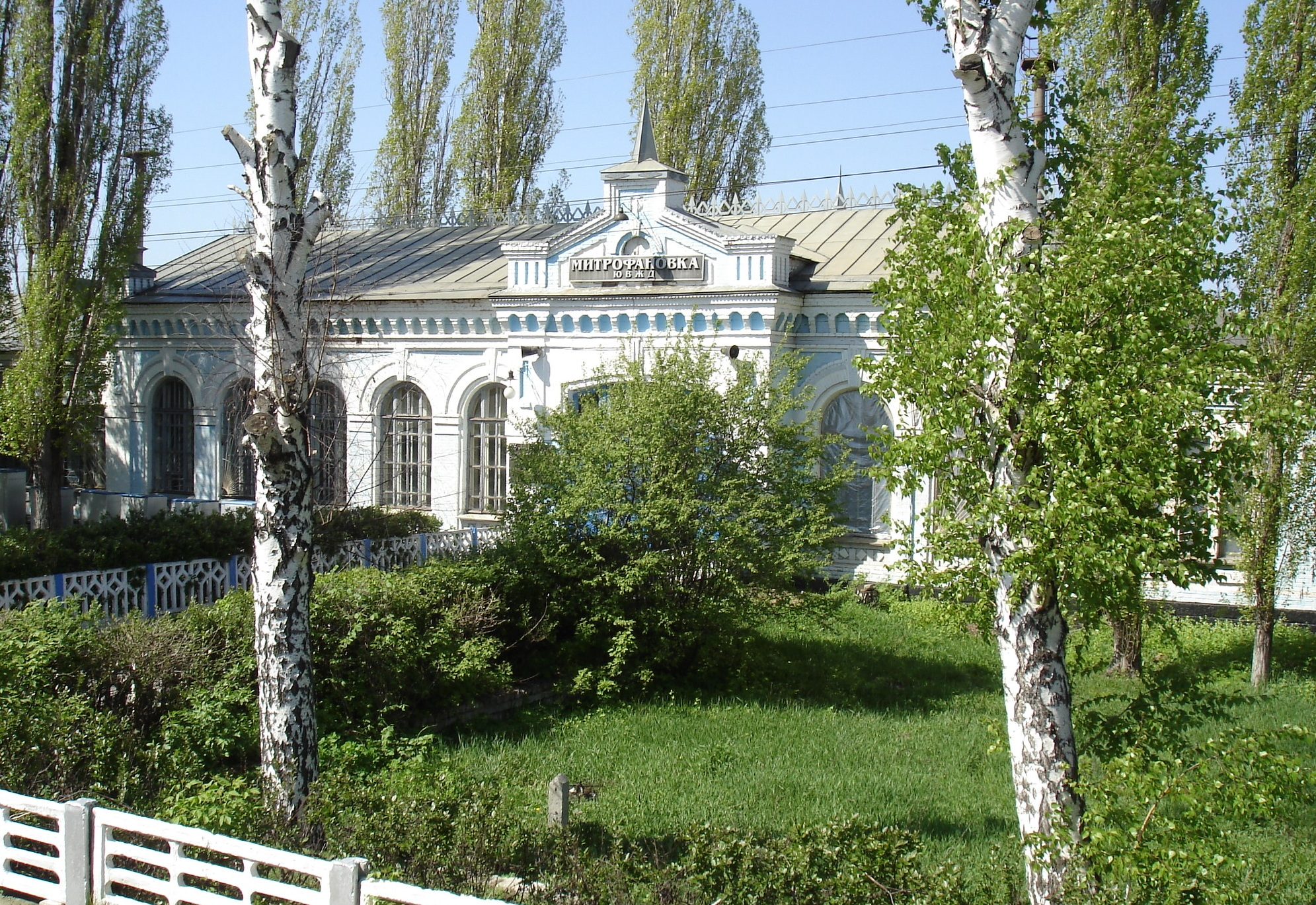 Железнодорожная станция Митрофановка